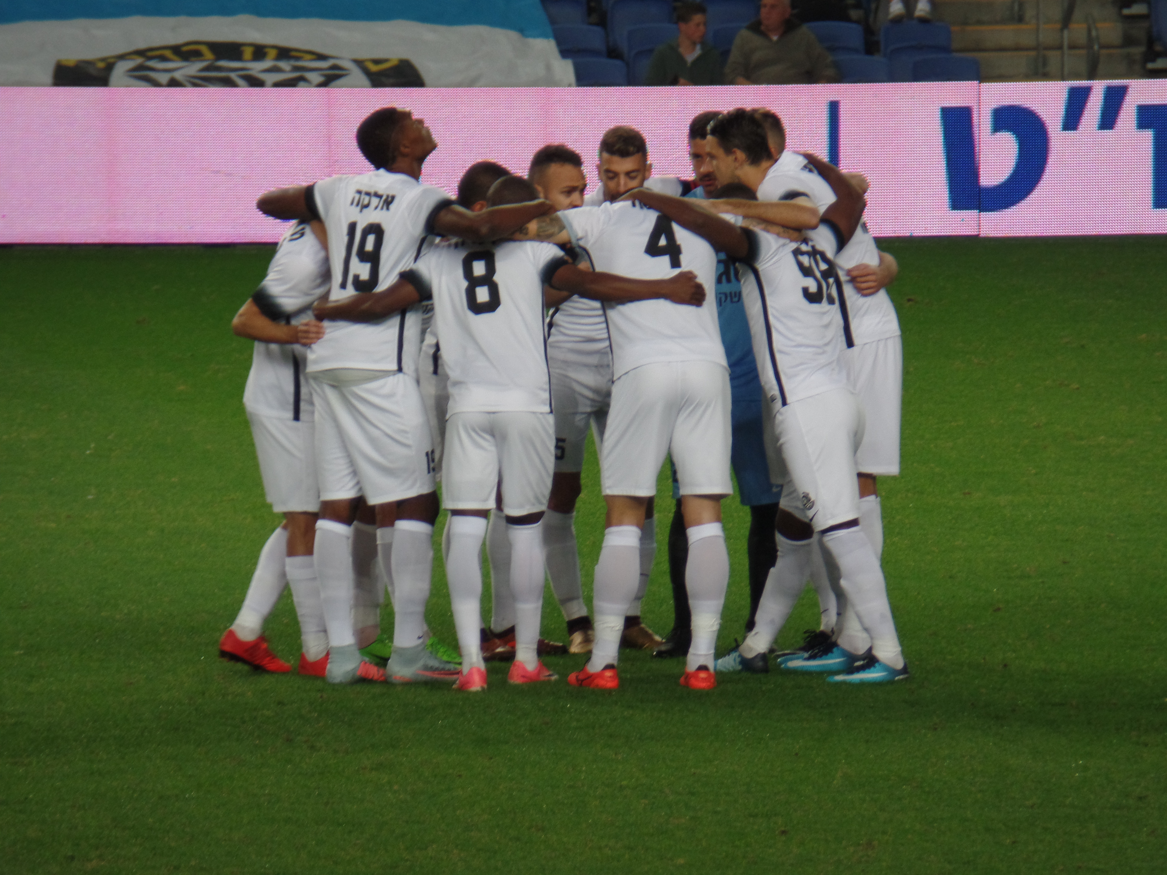 שחקני מ.ס. אשדוד 2018